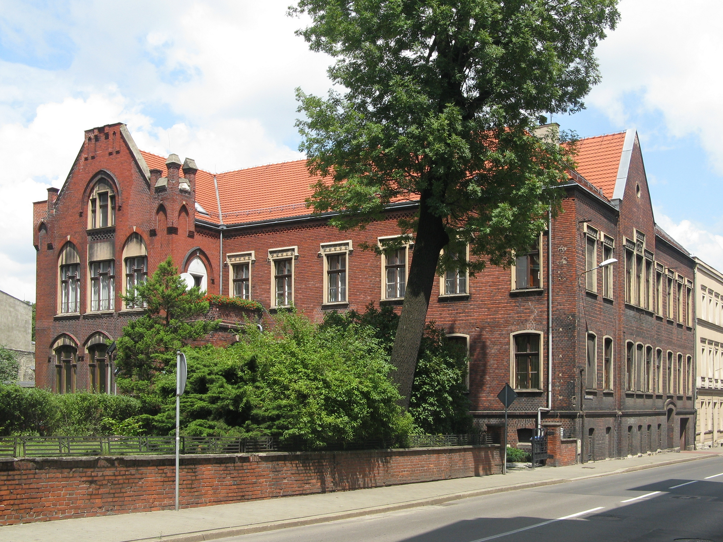 Plebania parafii Świętej Trójcy w Bytomiu z 1880, zabytek nr rej. 1345/87 z 12.06.1987.